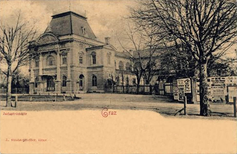 Graz, Industriehalle (erbaut 1880)